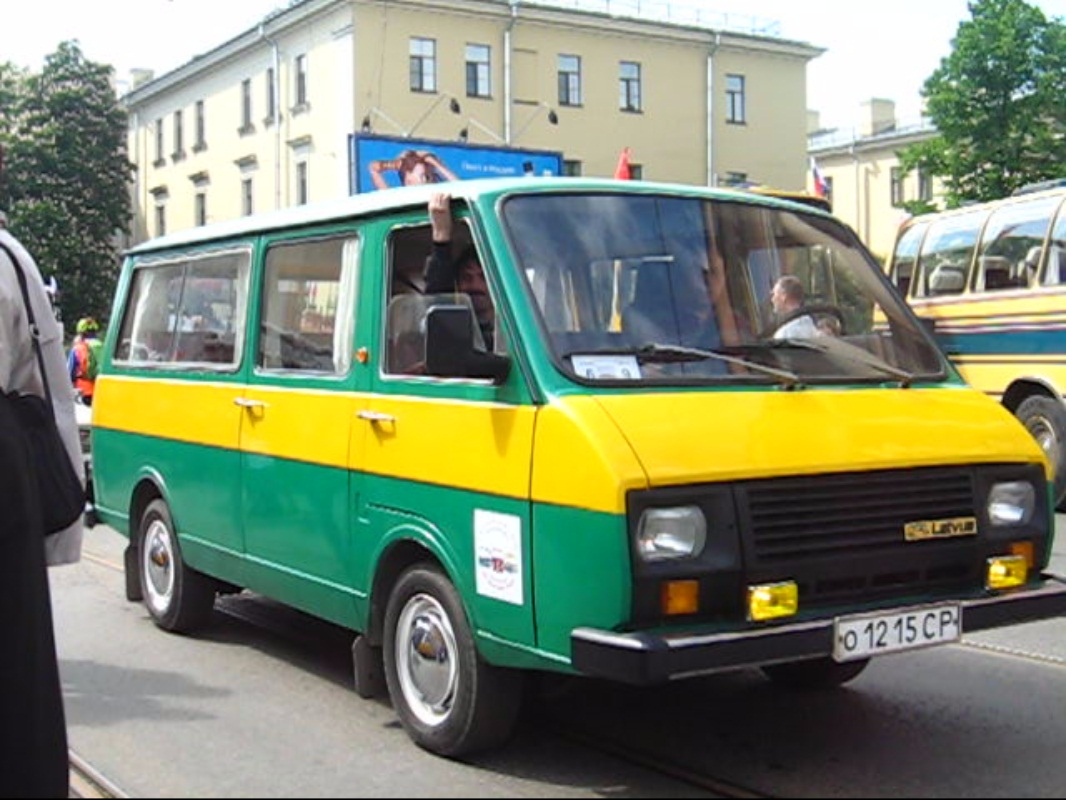 РАФ-22038 «Латвия» на II Петербургском параде ретро-транспорта 22 мая 2016 года